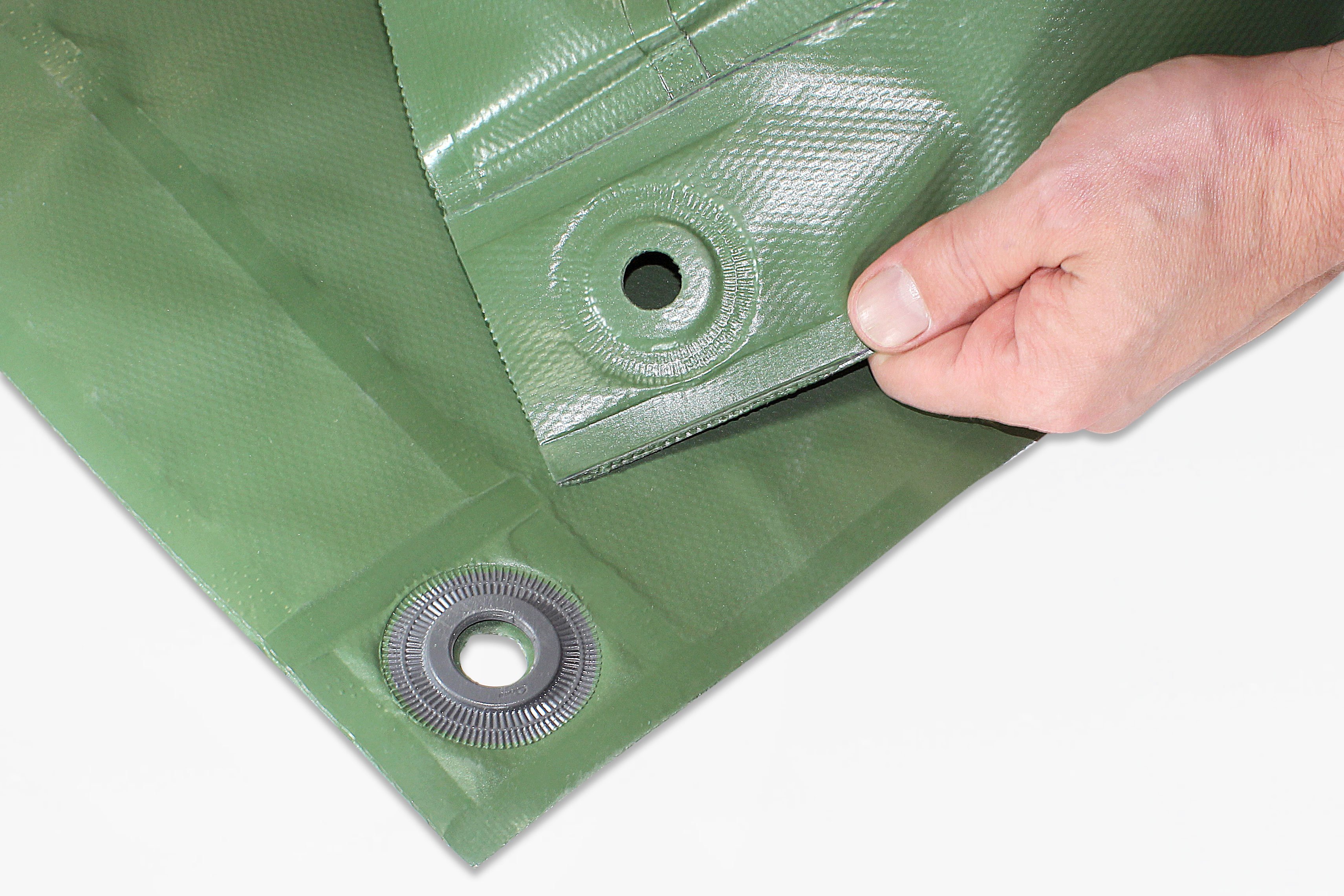 Presenning tillverkad i kraftig PVC med bårdade kanter och svetsade öljetter. Högfrekvens-svets har använts för en mycket stark produkt.